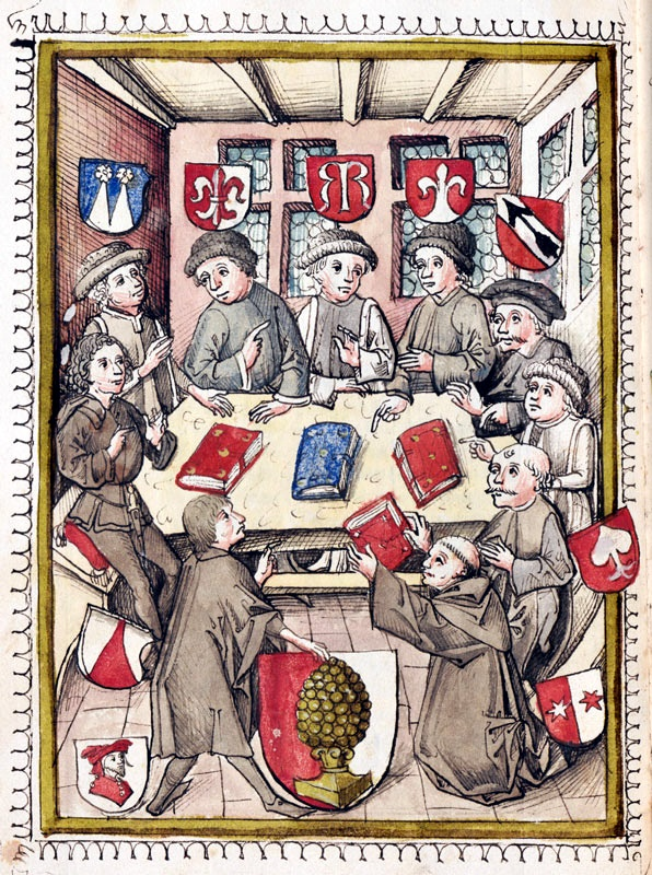 Widmungsbild aus Sigismund Meisterlins Augsburger Stadtchronik von 1457. Der Autor Sigismund Meisterlin übergibt seine Chronik an den Auftraggeber Sigismund Gossembrod dem Älteren. Links sitzend ein Ratsherr der Langenmantel vom Sparren, hinten mittig ein Ratsherr der Langenmantel vom doppelten R